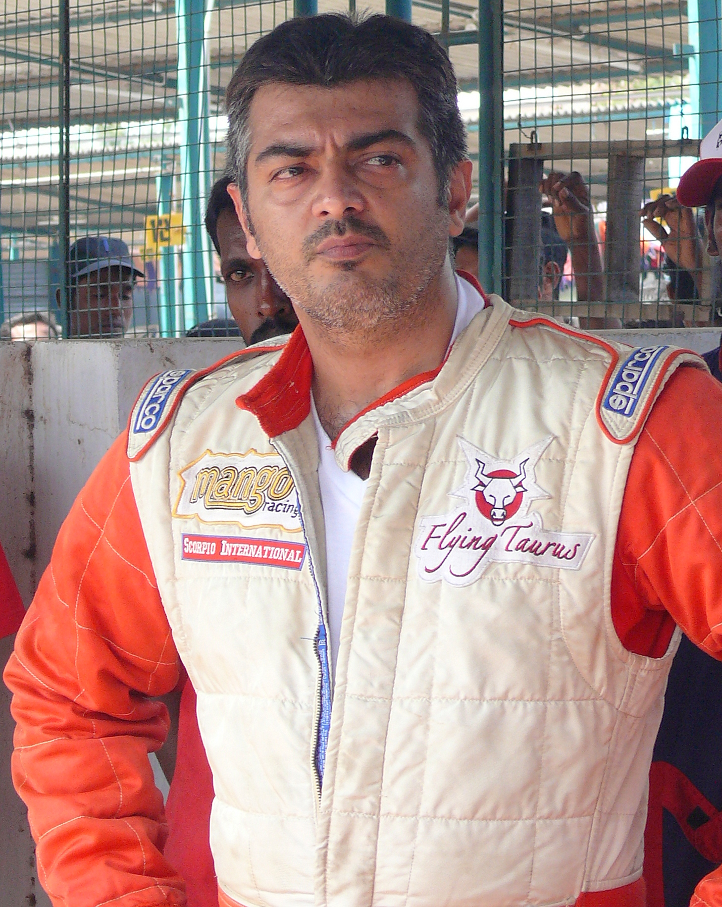 Irungattukottai Race Track , Irungattukottai, Sriperumbudur, Chennai